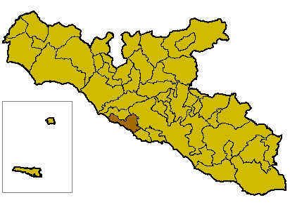 Lumbaart: Puzisiù de Siculiana endèla Pruvincia de Agrigènto.